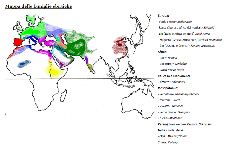 Mappa delle famiglie ebraiche nel mondo - descritte con codice colorato e preparata da me medesimo - genn.2013